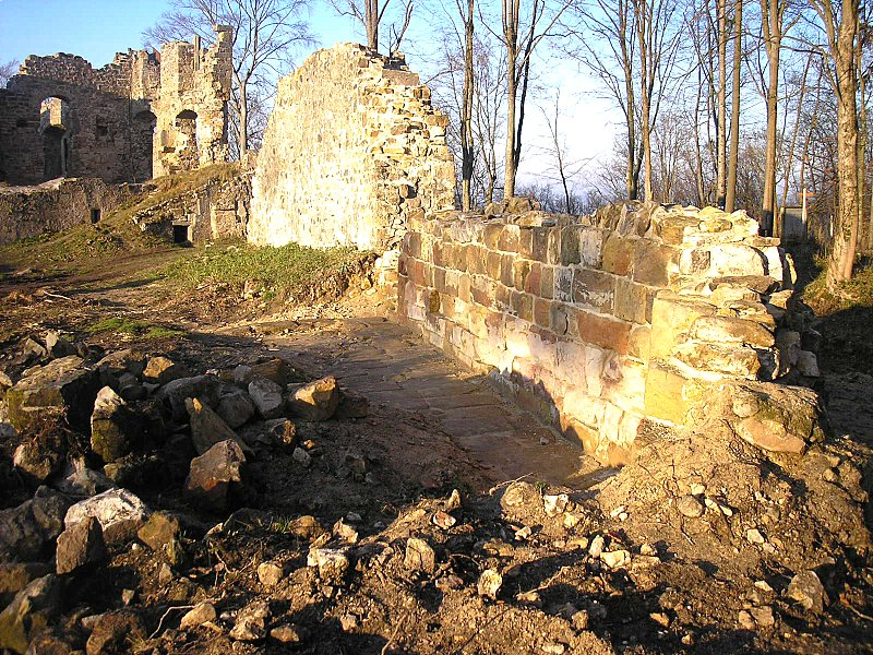 Burg Rauheneck (Raueneck) bei Ebern (Landkreis Haßberge, Unterfranken). Die freigelegte ältere Ringmauer während der Sanierung. Eigene Aufnahme, Dez. 2006 / Rauheneck (Raueneck) castle near Ebern (Lower Franconia, Germany). The first ringwall during conservation. Own photo, Dec. 2006